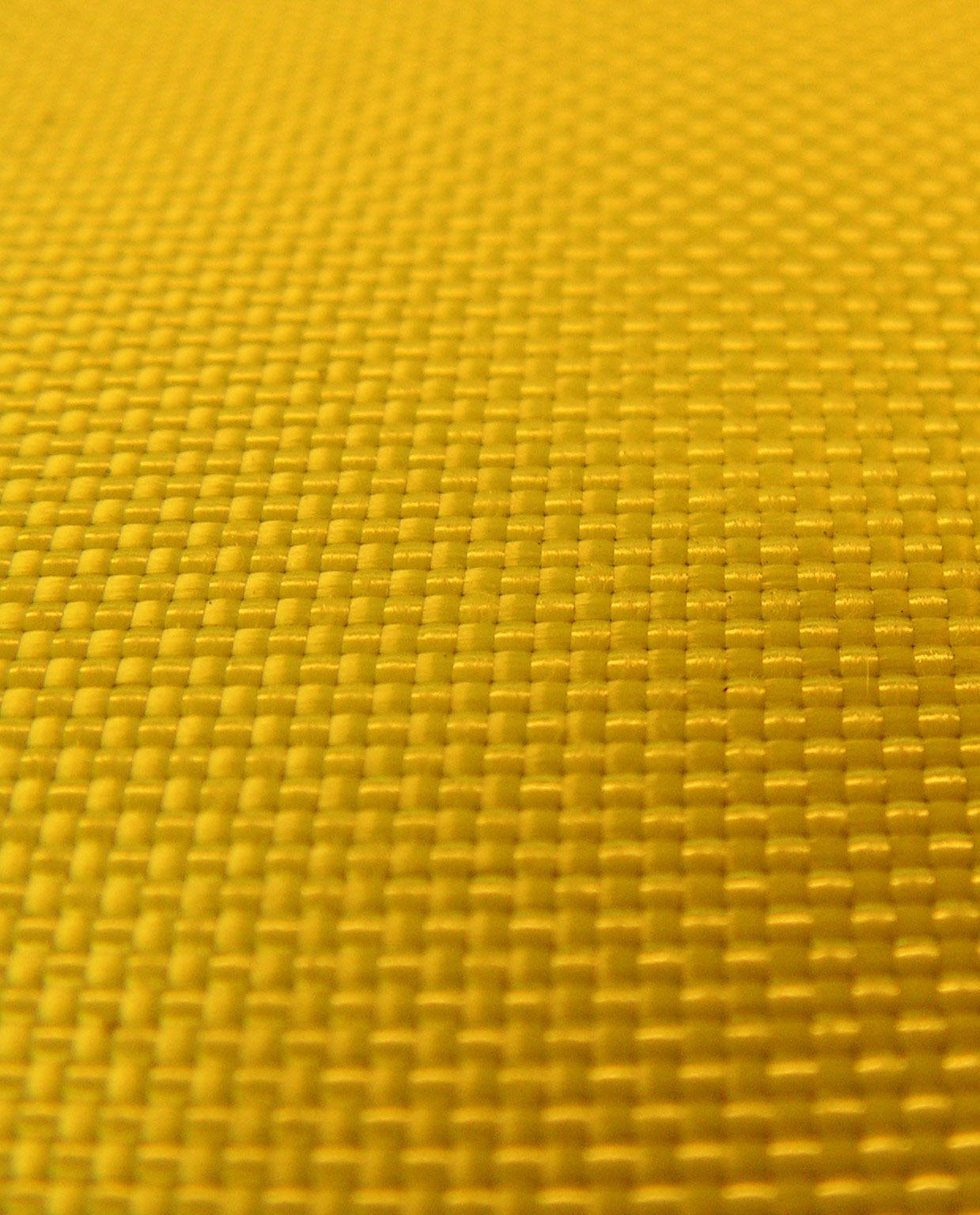 Tissage de fibres d'aramide